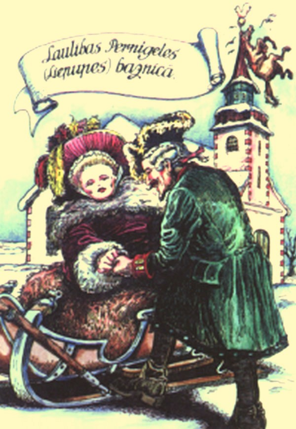 Münchhausen mit Braut vor der Kirche zu Pernigele (Liepupe)